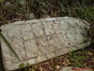 Imagen de codigos en ruinas mayas en Dziuché Quintana Roo.